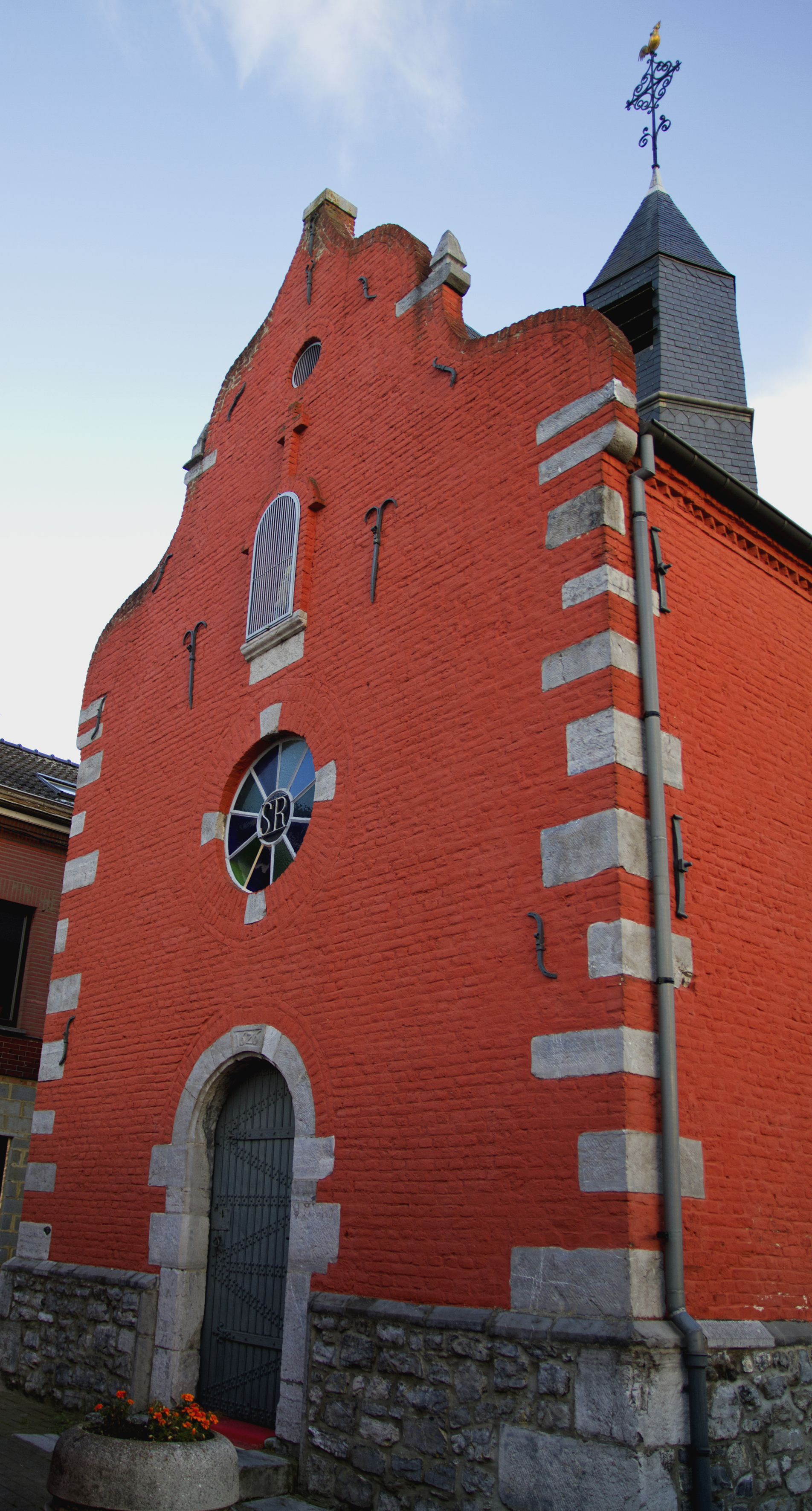 Chapelle Saint-Roch à Châtelet (Belgique)